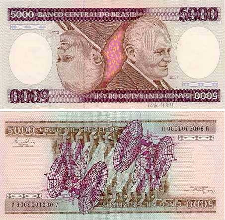 Cédula de 5000 cruzeiros com a efígie de Castelo Branco, que circulou entre 1981 e 1989.